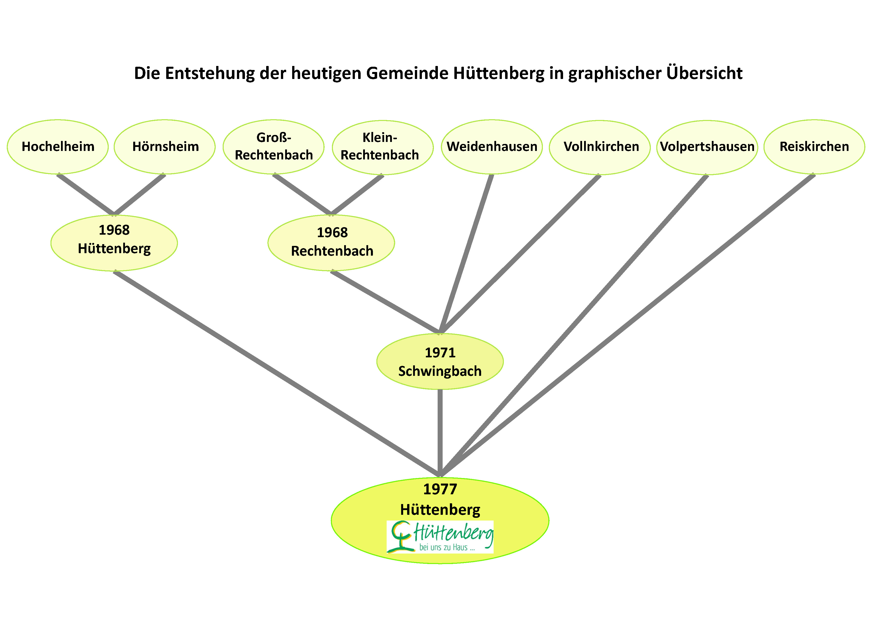 Entstehung der Gemeinde Hüttenberg in graphischer Übersicht. Zusammenschlüsse 1968 (Hochelheim und Hörnsheim zur Gemeinde Hüttenberg, Groß- und Klein-Rechtenbach zur Gemeinde Rechtenbach) und 1971 (Rechtenbach,Weidenhausen, Vollnkirchen zur Gemeinde Schwingbach) und 1977 Auflösung der Gemeinde Schwingbach und Zusammenschluss von Hüttenberg, Rechtenbach, Weidenhausen, Vollnkirchen, Volpertshausen und Reiskirchen zur heutigen Großgemeinde Hüttenberg